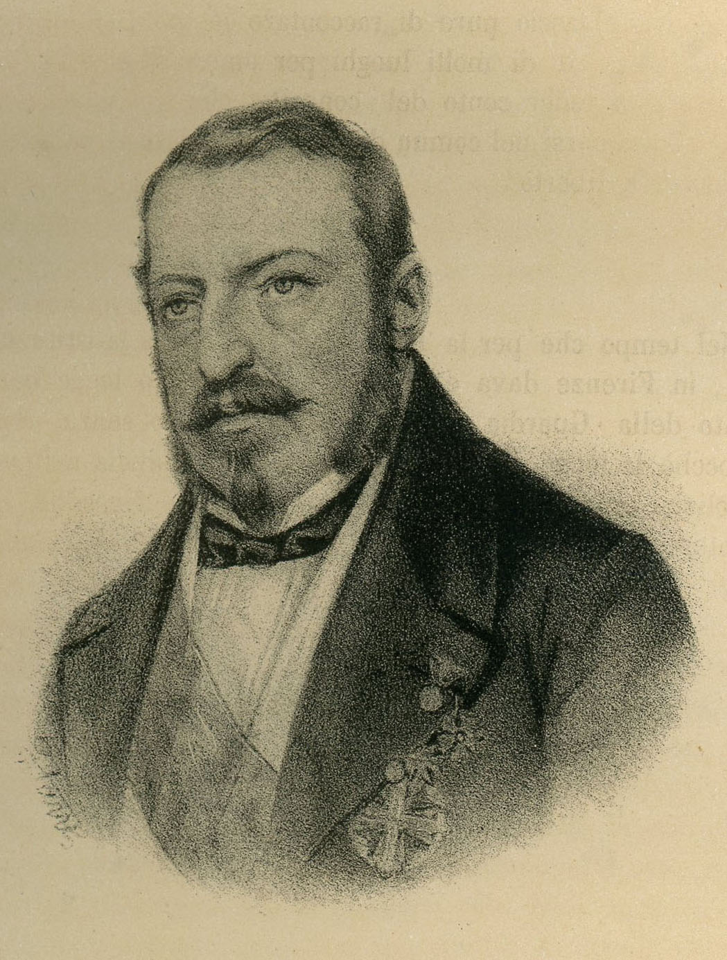 Neri Corsini (litografia).